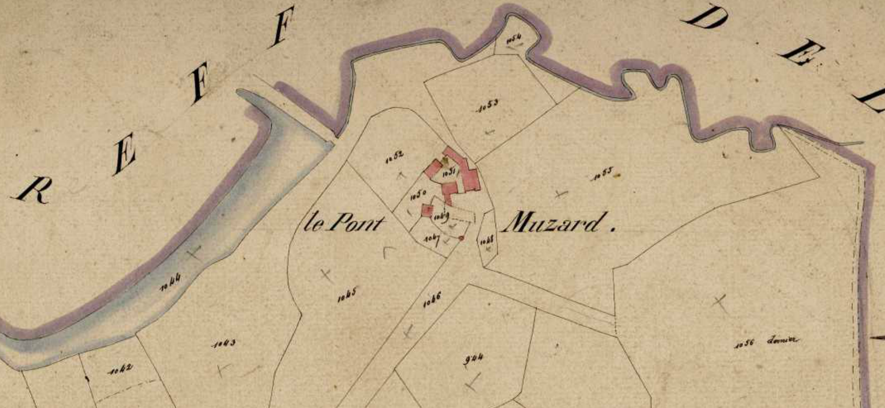 Plan cadastrale napoléonien de Pont-Muzard (1823)